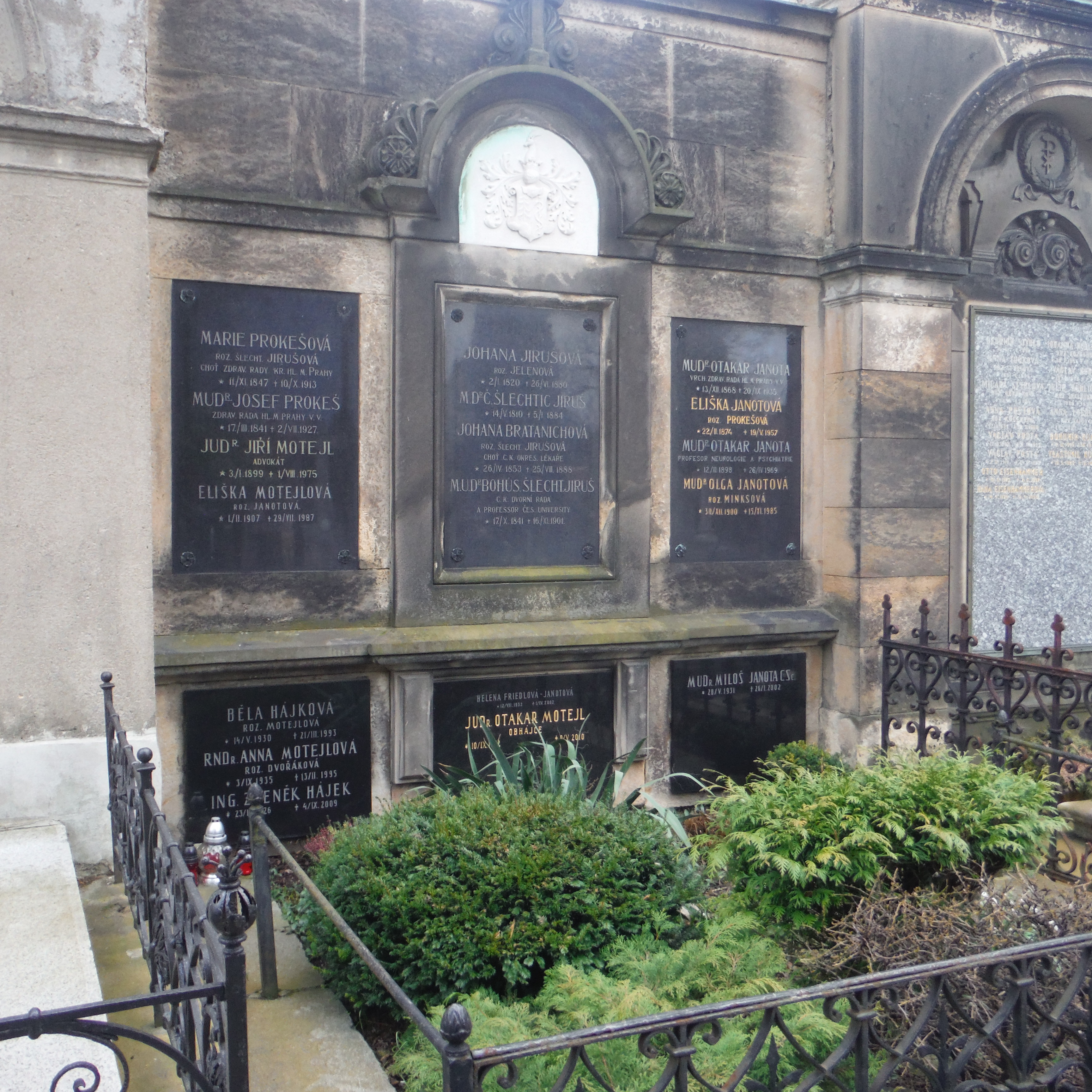 hrob